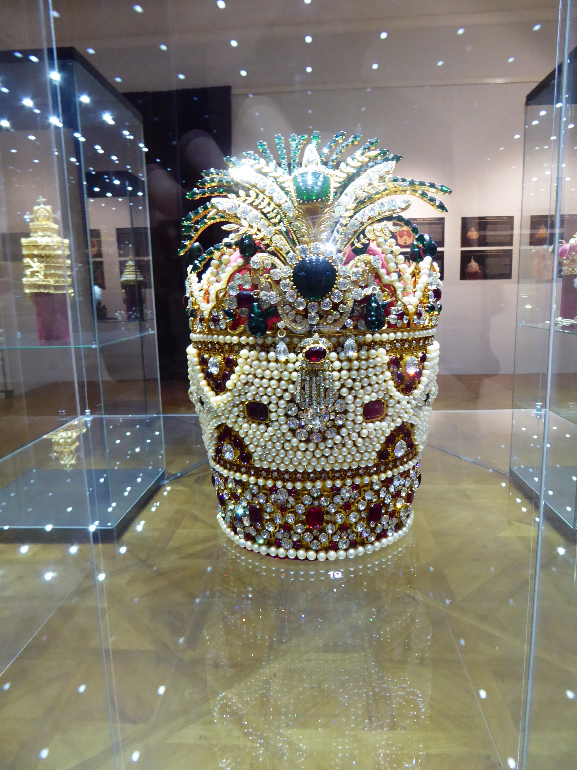 Koruny na výstavě Korunovační klenoty v dějinách světa ve Valticích. Koruna Kiani